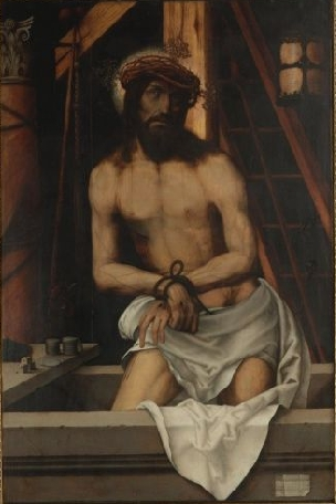 Luca di leida, cristo croficisso